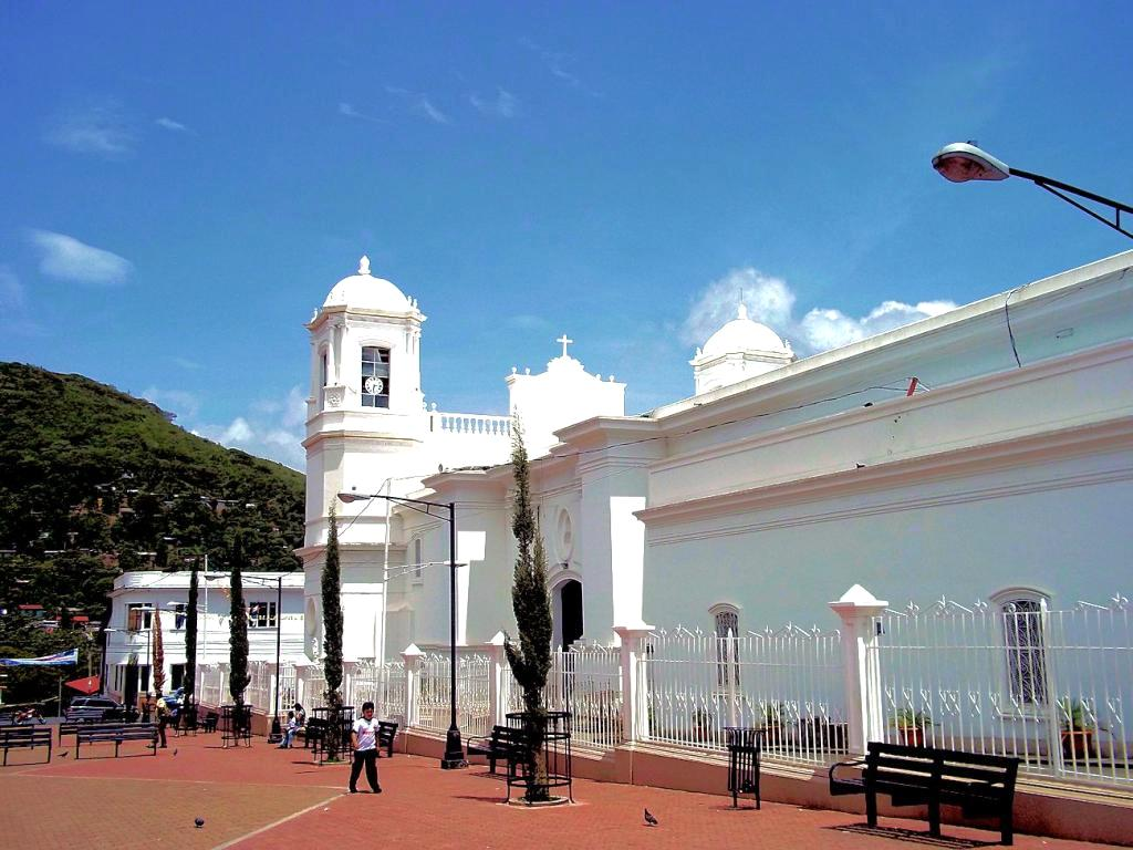 Catedral Matagalpa, parque central